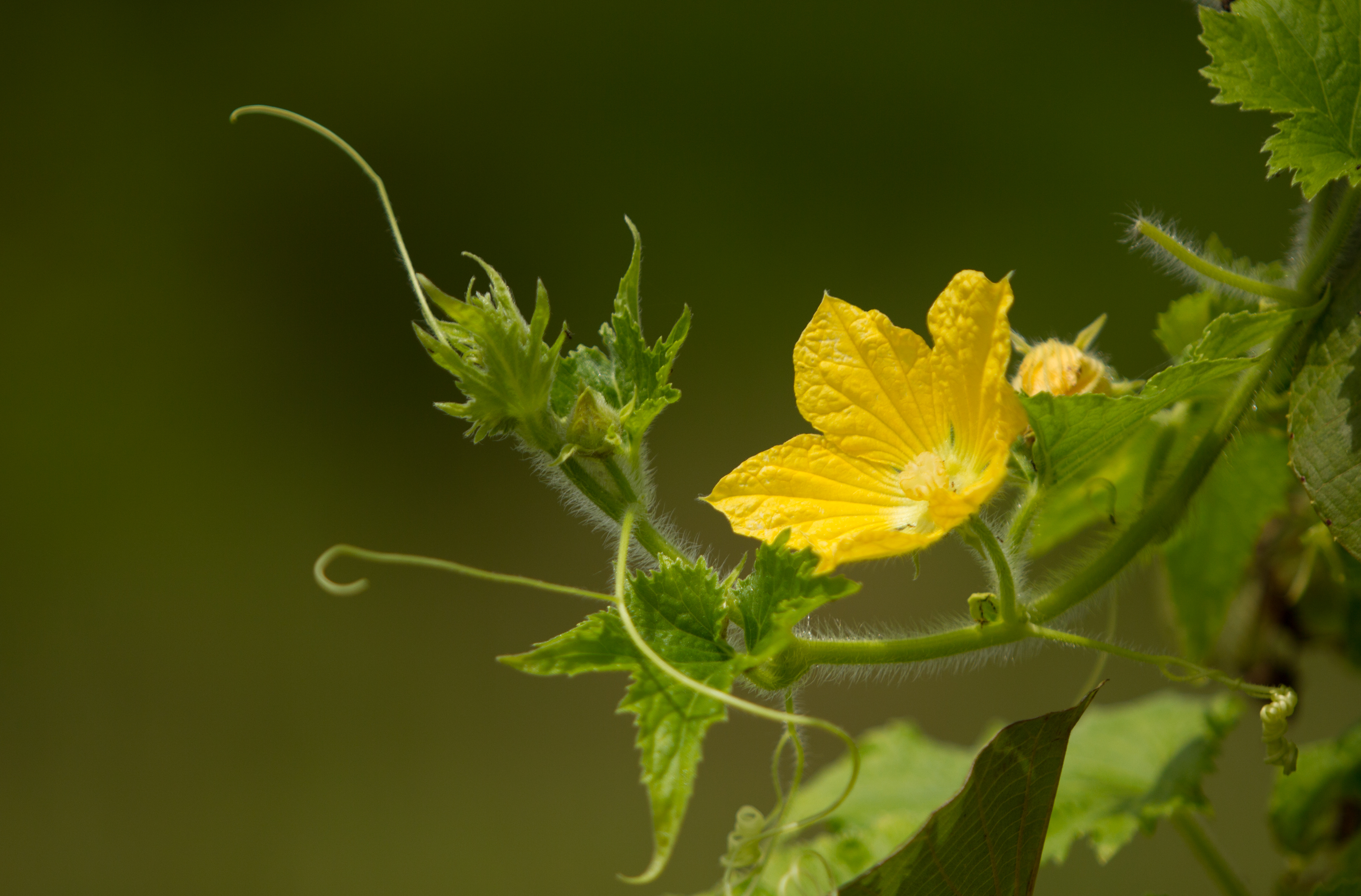 കുമ്പളവള്ളിയും പൂവും